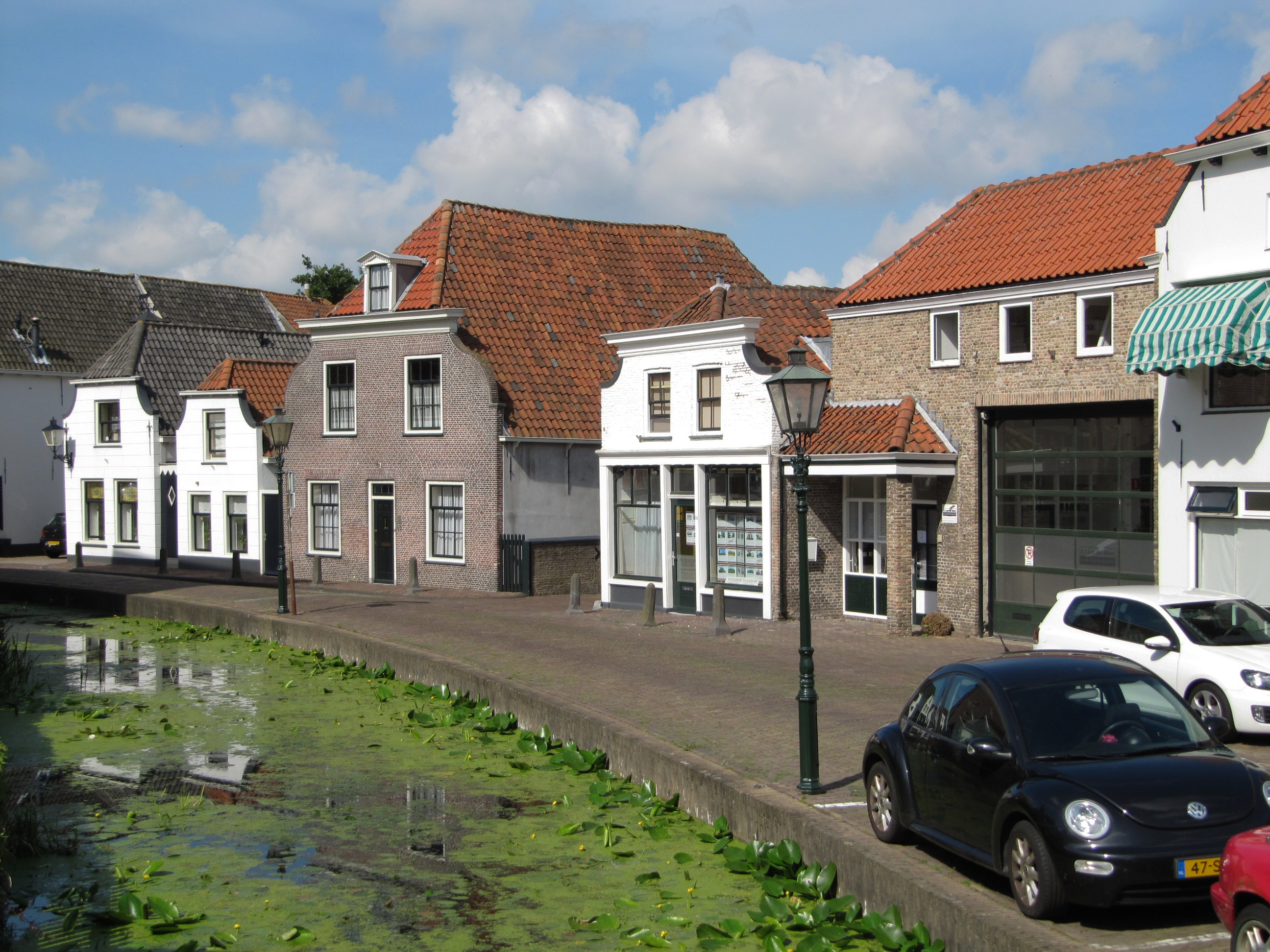 Maasland - 's Herenstraat.jpg